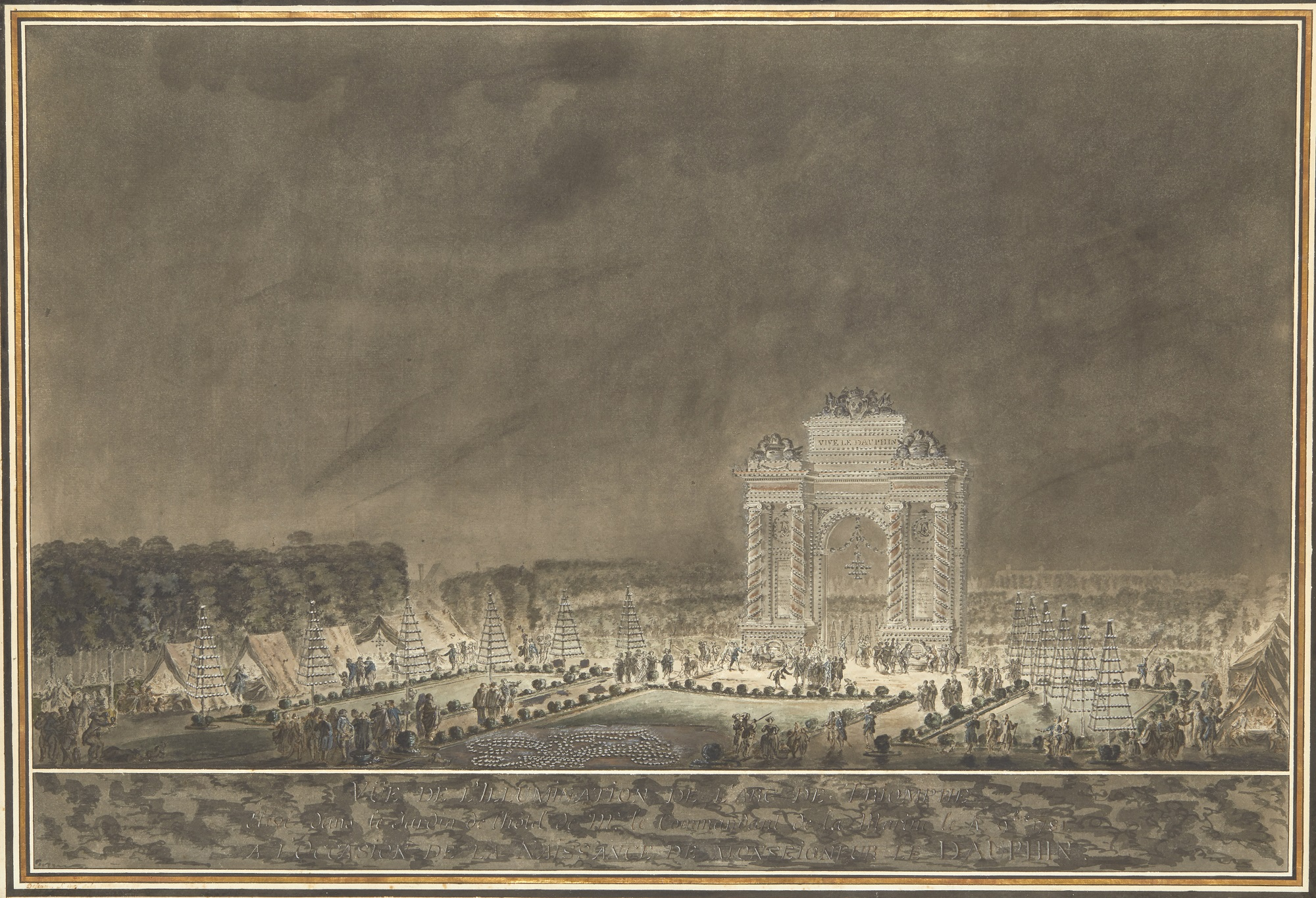 Plume et encre de Chine, lavis gris, rehauts de gouache - 51 x 75 cm Paris, Bibliothèque de l’Institut national d’histoire de l’art Photo : Stéphane Briolant